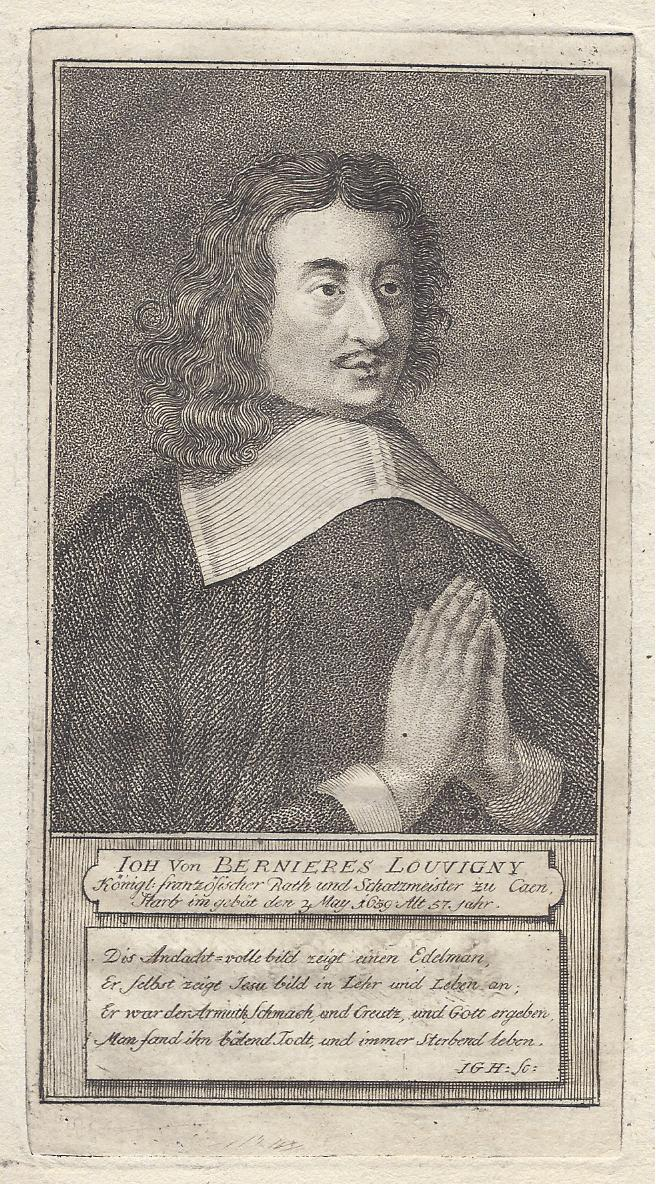 Porträt des Jean de Bernieres-Louvigny, Kupferstich von I.G.H